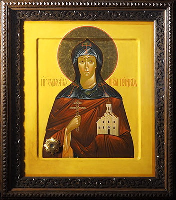 Икона Евфросинии-Полоцкой с частицею ощей